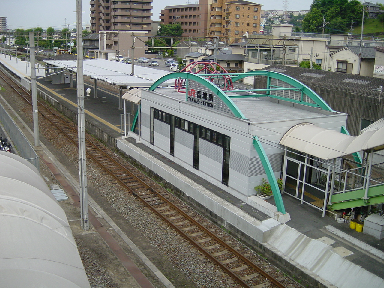 JR九州 日豊本線 高城駅 跨線橋から投稿者撮影。